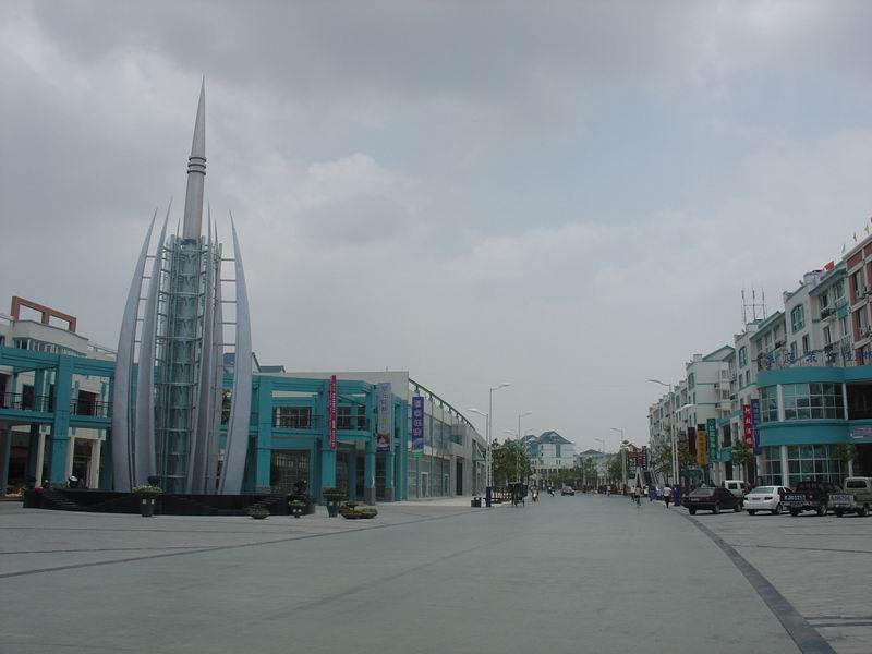 Jiaojiang, Taizhou, Zhejiang, China